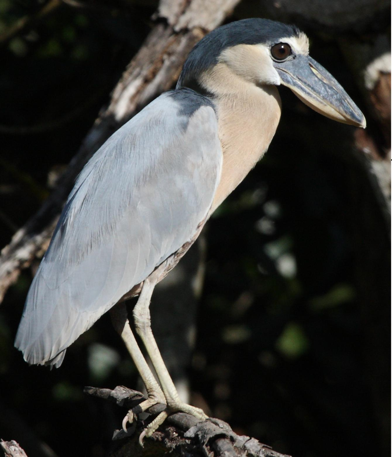 Cochlearius cochlearius